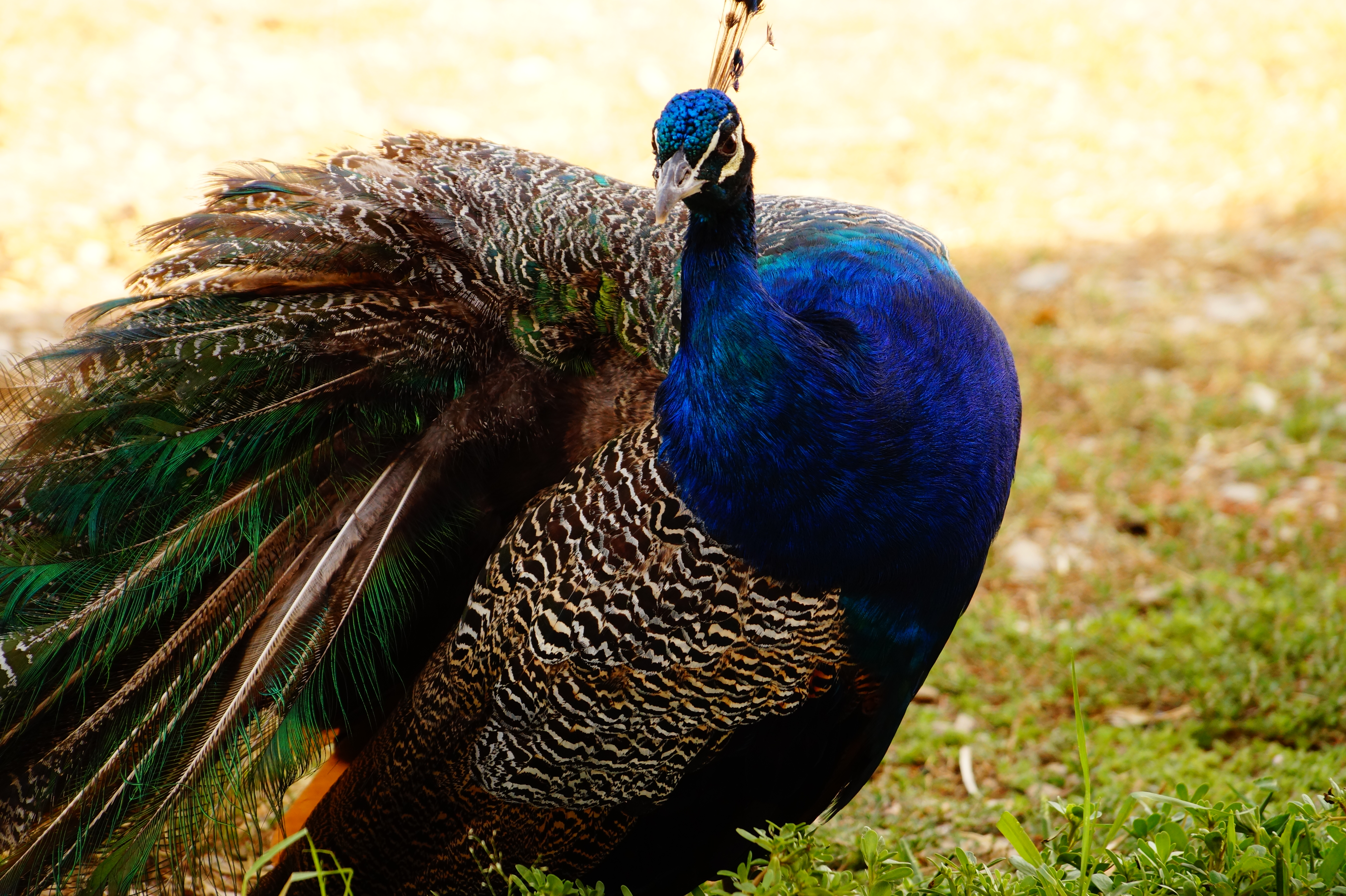 Дагестанский заповедник: Кумторкалинский район, Дагестан This image is related to the protected area of Russia number 0500024